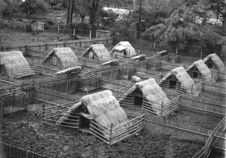 Volksgut "Gerhard Eisler" in Pommritz, Kreis Bautzen geht neue Wege in der Schweinezucht. Der Betriebsleiter des Volksgutes, Georg Fischer, ein früherer Landarbeiter, fand sich nicht damit ab, dass die Sterblichkeit bei den Ferkeln 40 % und mehr betrug. Seit Januar 1950 führte er Versuche nach den Lehren Mitschurins durch, um die Schweine und Ferkel gesündere Lebensbedingungen zu schaffen und leistungsfähigere, abgehärtete Tiere zu züchten. Er richtete Schweinehütten aus Holzstangen und Strohdächern in Kleingehegen ein, in denen die Muttersauen einige Wochen vor dem Ferkeln untergebracht werden. Muttertiere und Ferkel halten sich im Sommer wie im Winter (auch bei 20 Grad Kälte) in den Hütten und im Freien auf. -Nach dieser Neueinführung schwand die Sterblichkeit bei den Ferkeln in kurzer Zeit gänzlich. Auch entwickeln die Ferkel durch den Aufenthalt im Freien eine derartige Freßlust, dass sie nicht mehr die früher notwendigen 12 Monate, sondern nur noch 8-9 Monate bis zur Schlachtreife (140-150 Kilogramm) benötigen. UBz, Übersicht über die Schweinehütten. Illus-Mammsch 26.5.1951